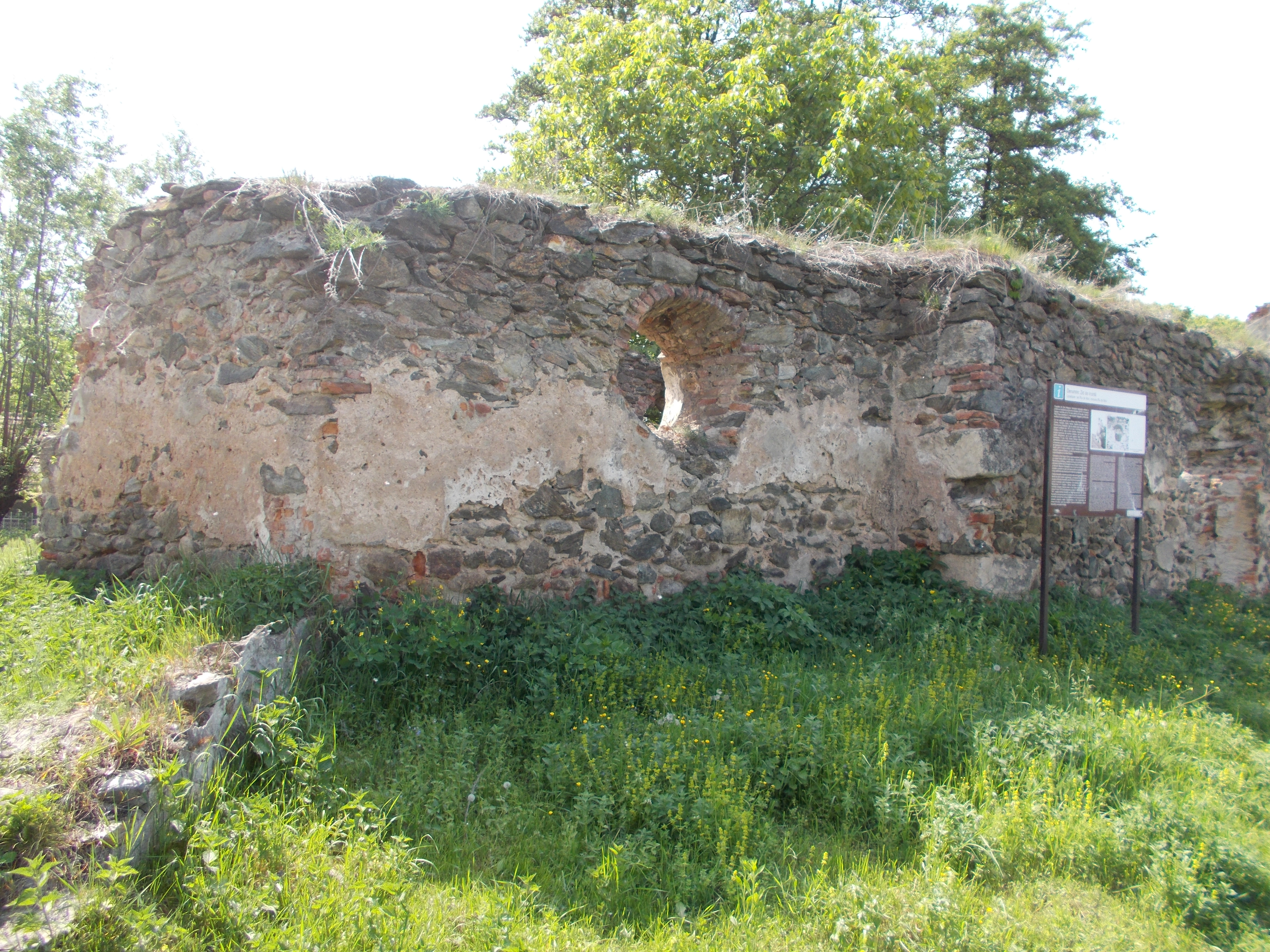 Curtea nobiliară a Cândeștilor (Zid de incintă) 03